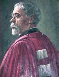 Photographie d'un portrait en peinture à l'huile (vue de trois-quarts gauche) de Maurice Hauriou (1856-1829)